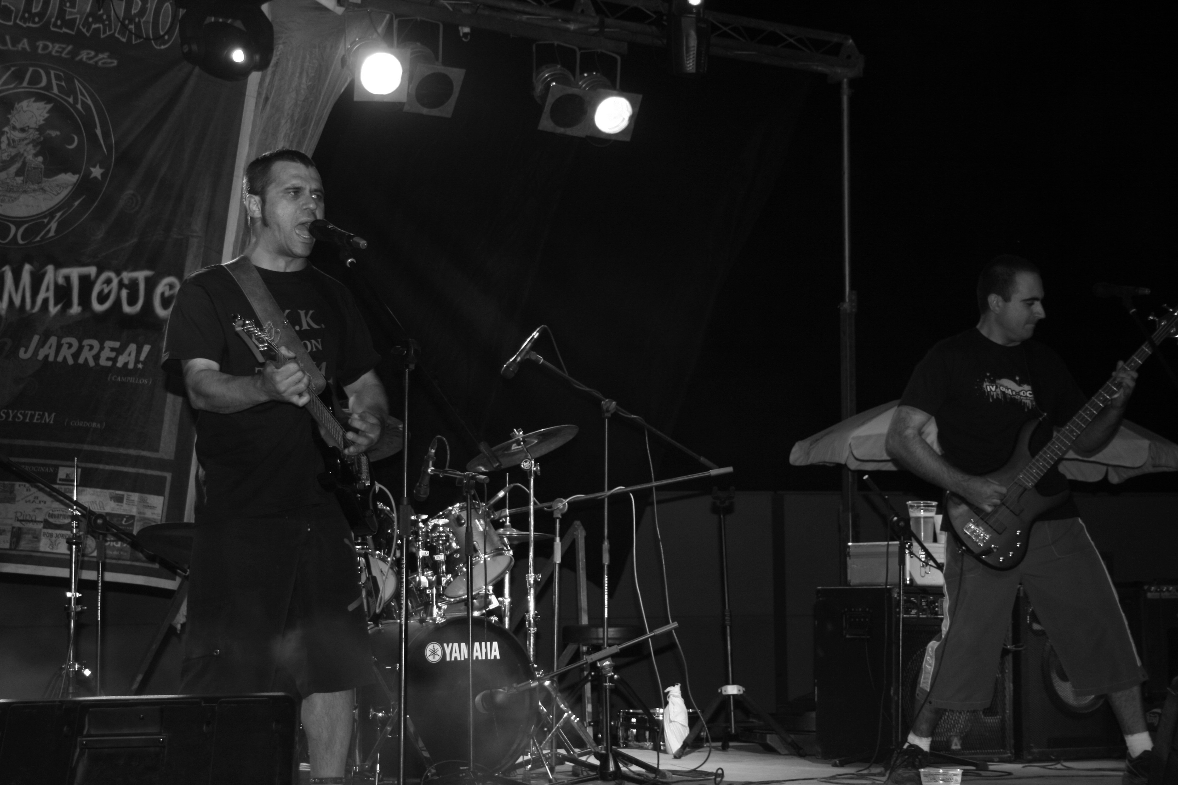 Foto en directo del grupo musical Jarrea, obtenida en Villa del Rio (Córdoba) en Agosto de 2008.